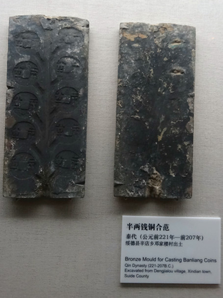 半两钱铜合范，绥德县辛店乡邓家楼村出土，现藏于陕西历史博物馆